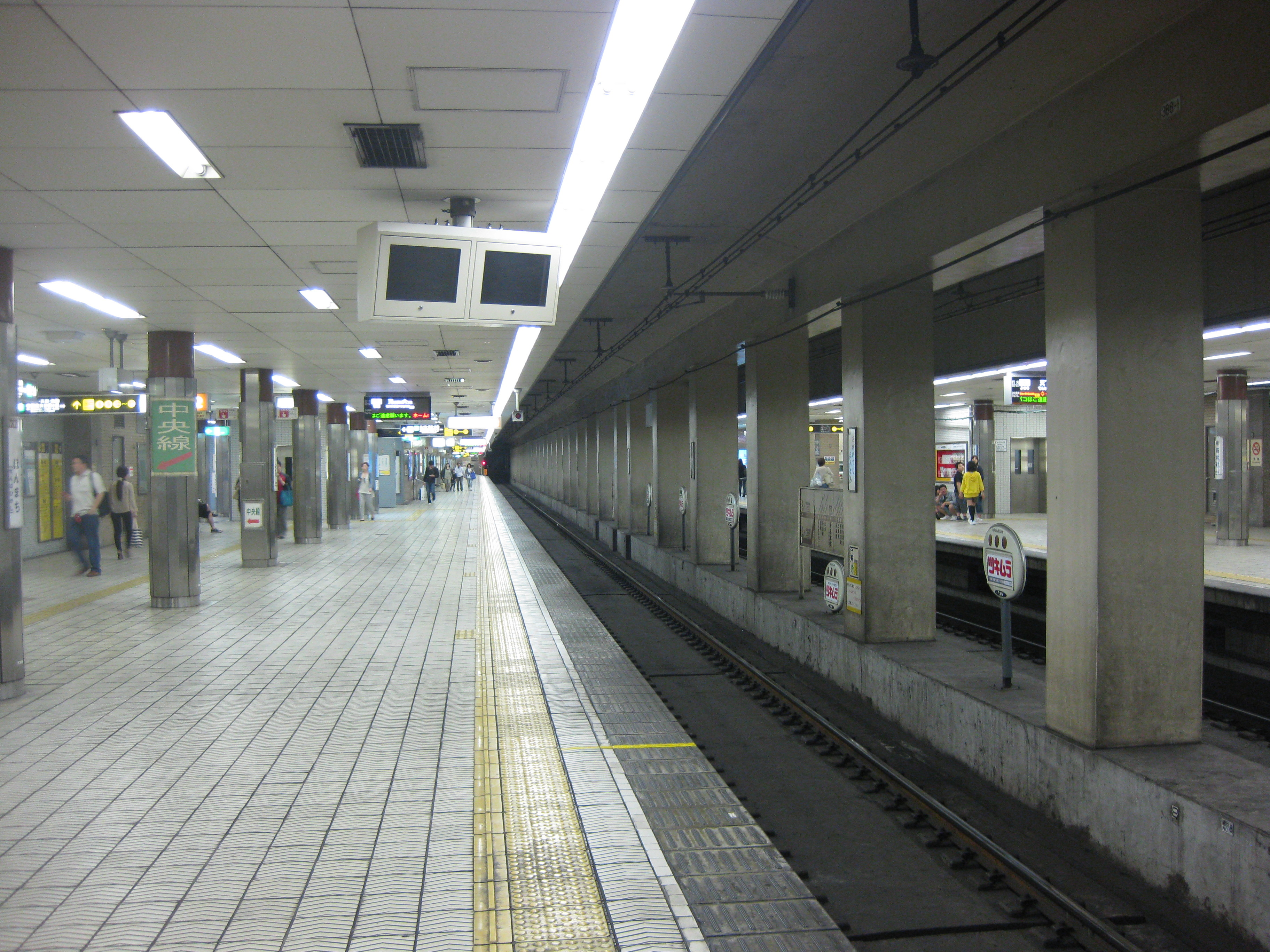 大阪市営地下鉄堺筋線堺筋本町駅プラットホーム